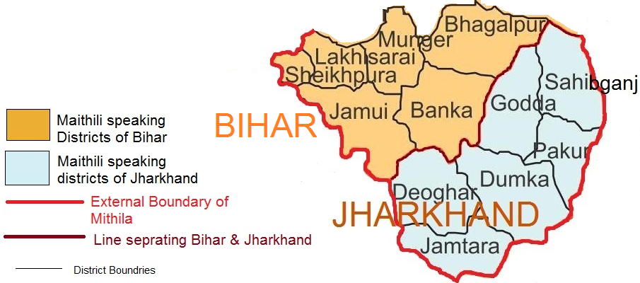 昂卡地區地圖